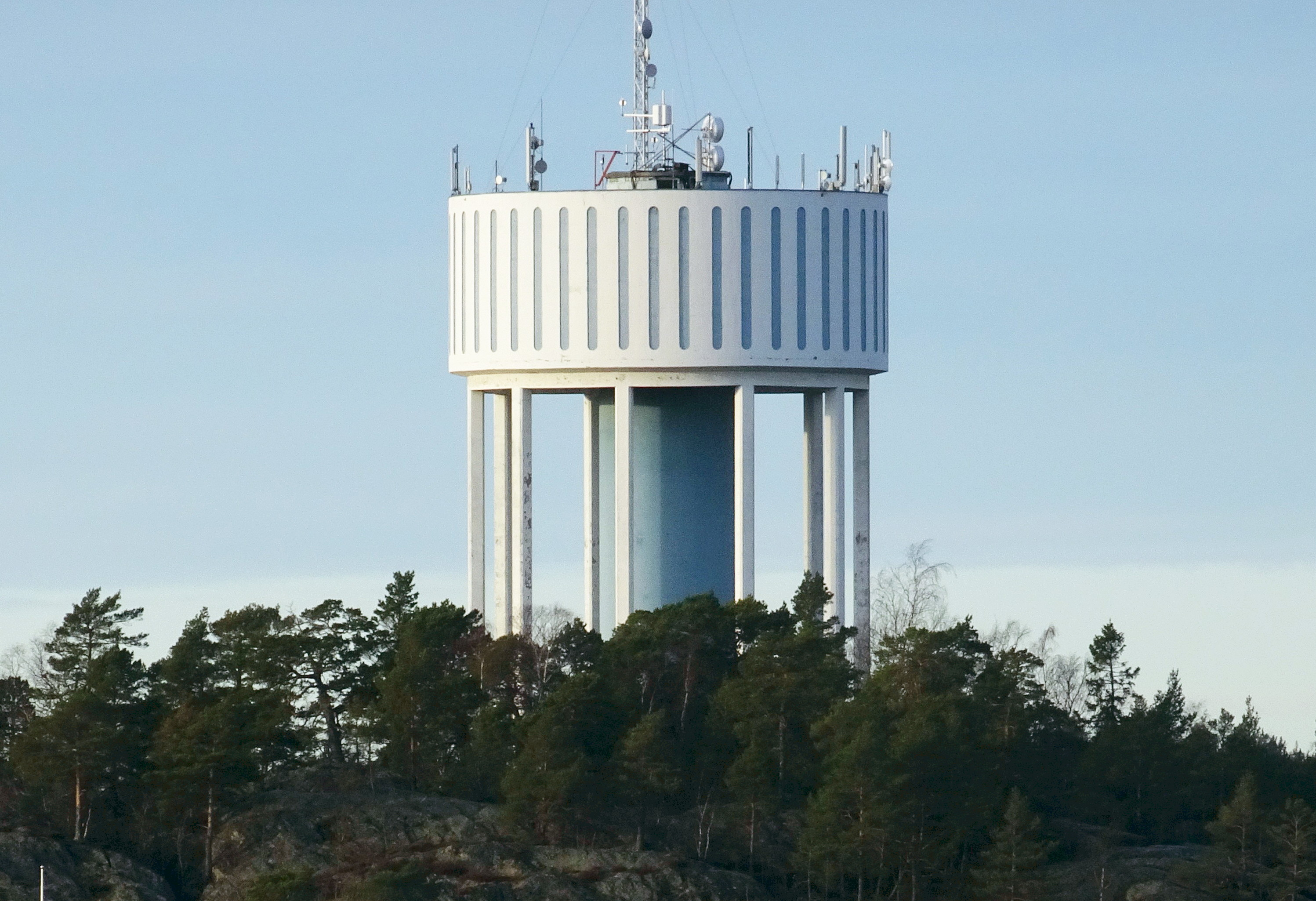 Nynäshamns vattentorn sett från Trehörningens gamla vattentorn